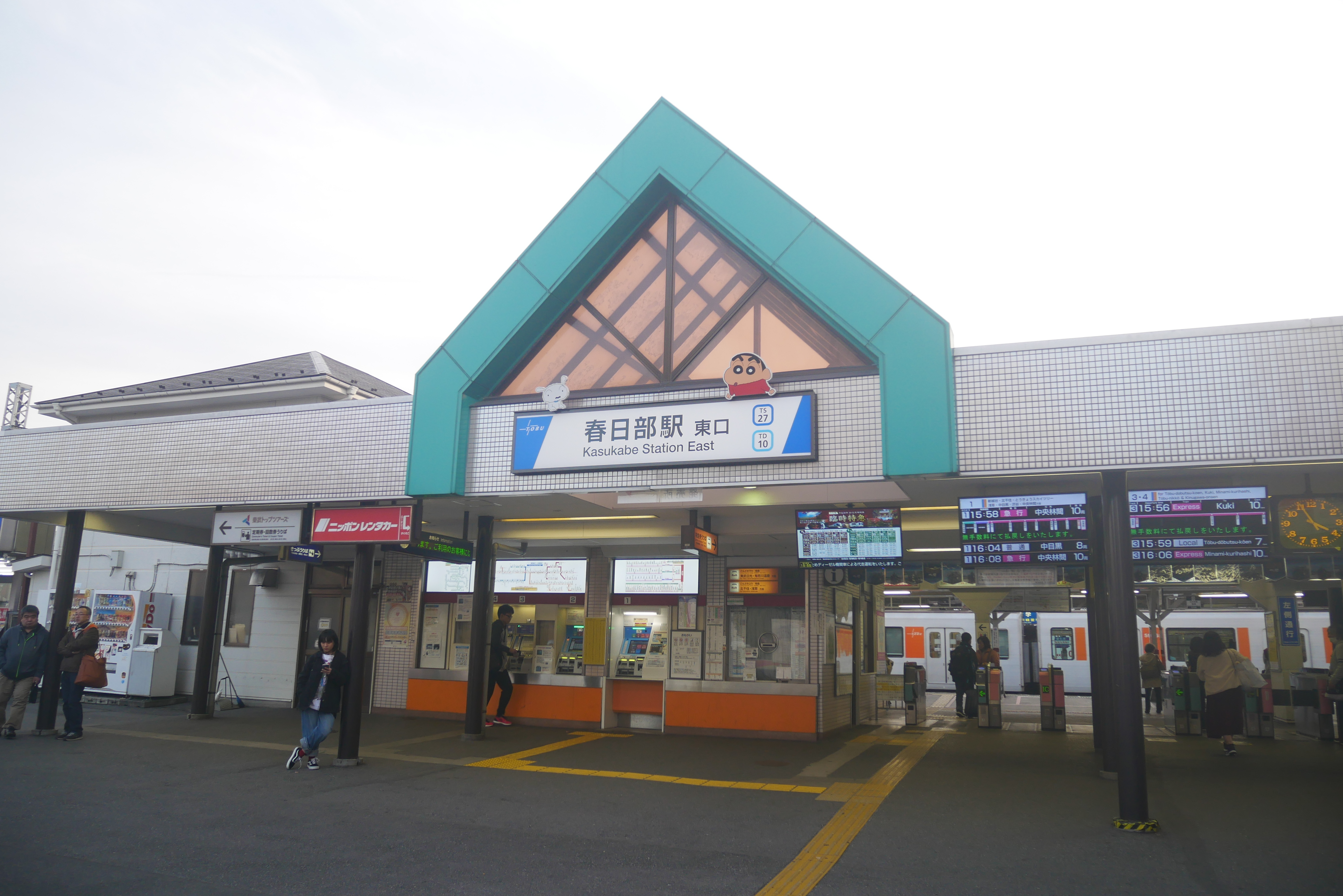 Kasukabe Station east exit (春日部駅の東口)